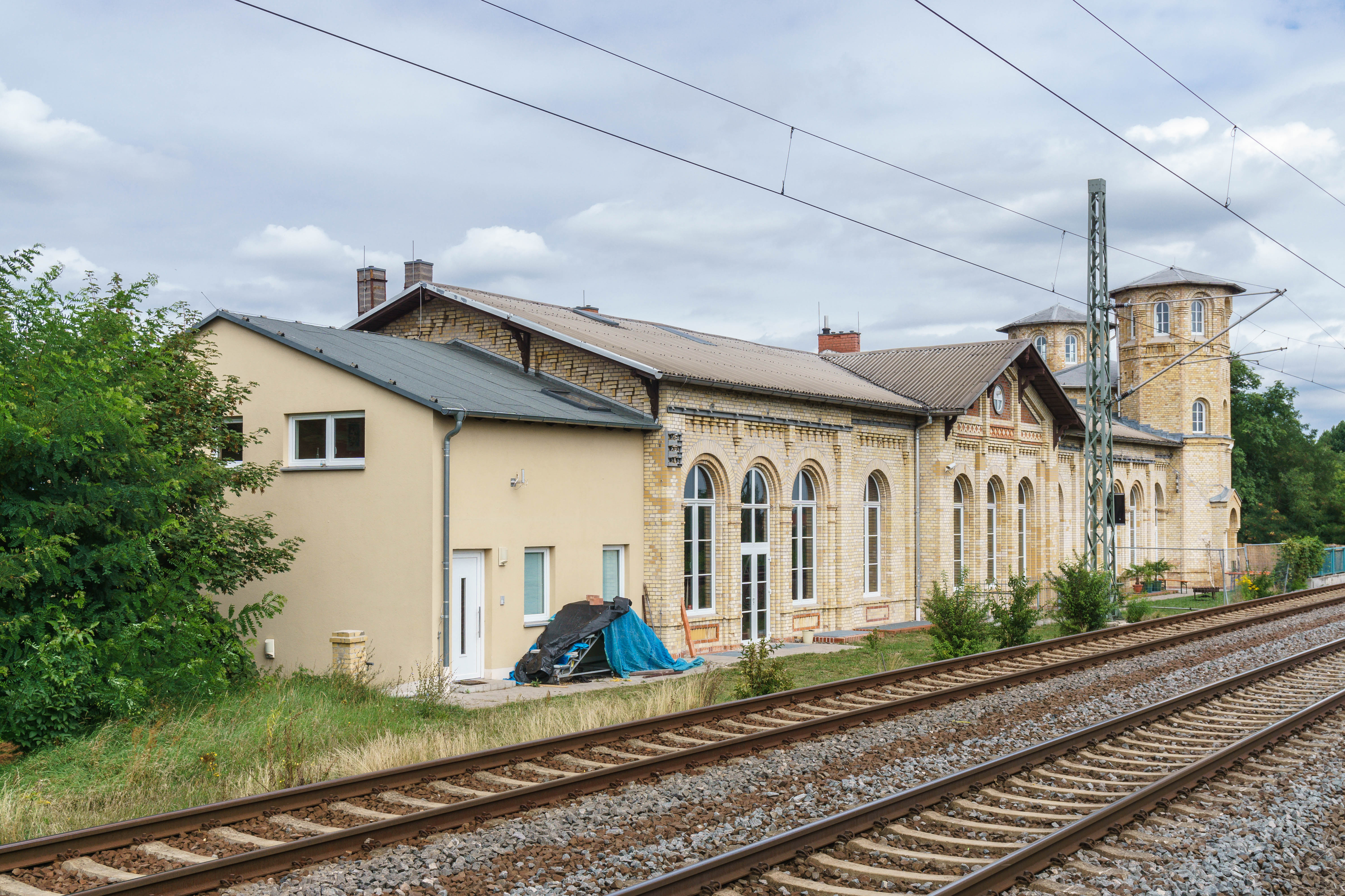 Oberer Bahnhof (jetzt Theaterakademie), Anna-Zammert-Straße 1 in Delitzsch